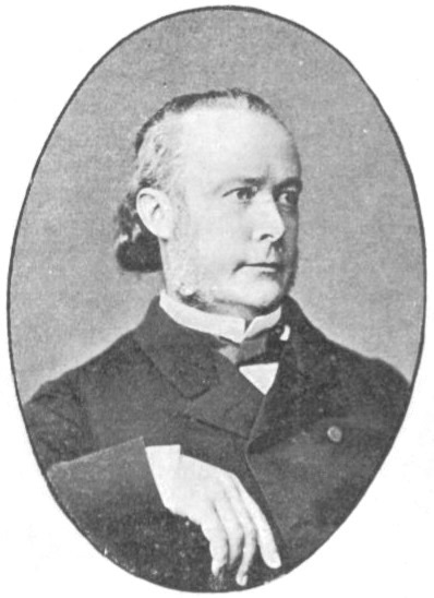 "M. Albert Grévy".